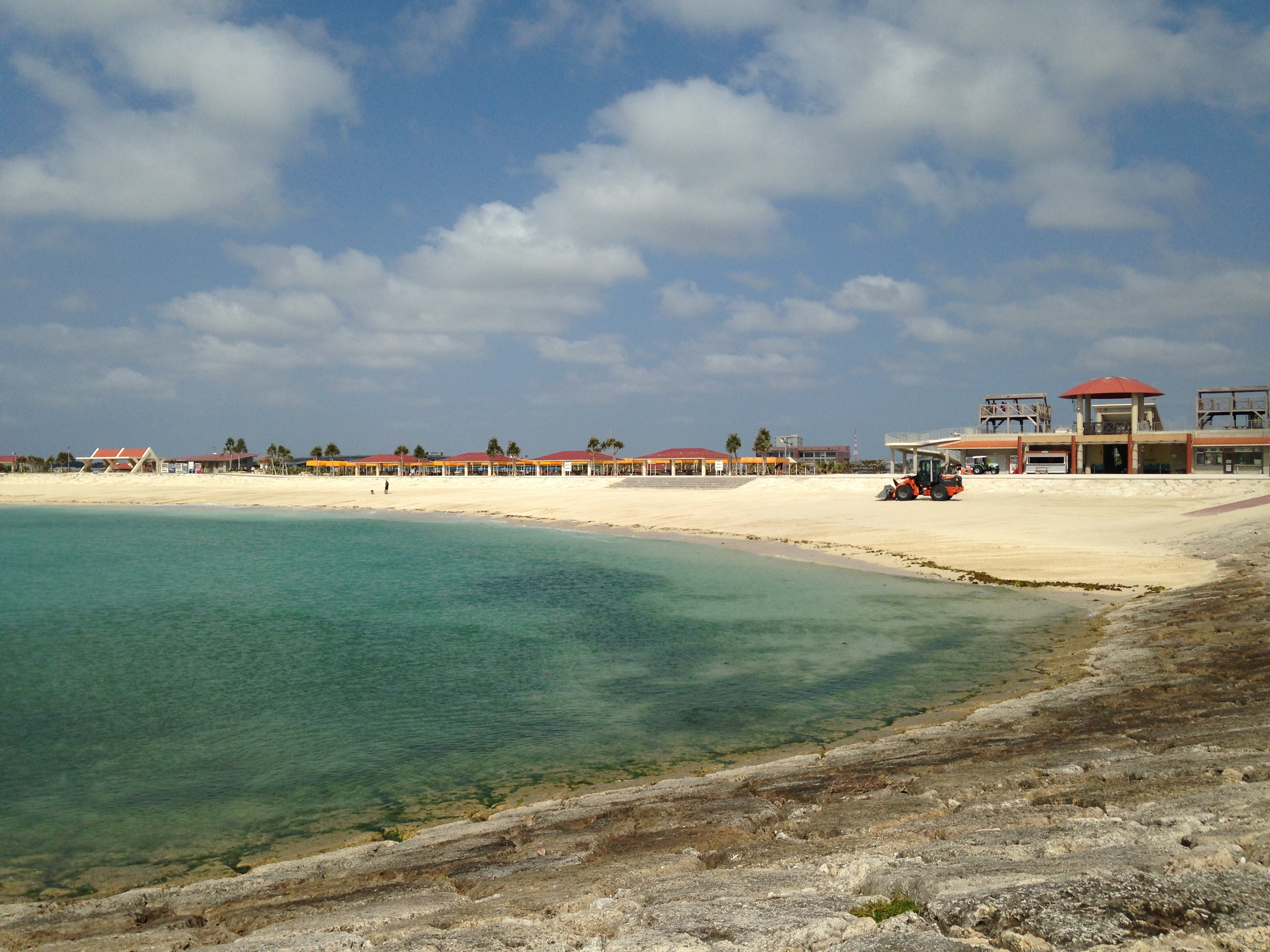 豊崎美らSUNビーチ(北浜)